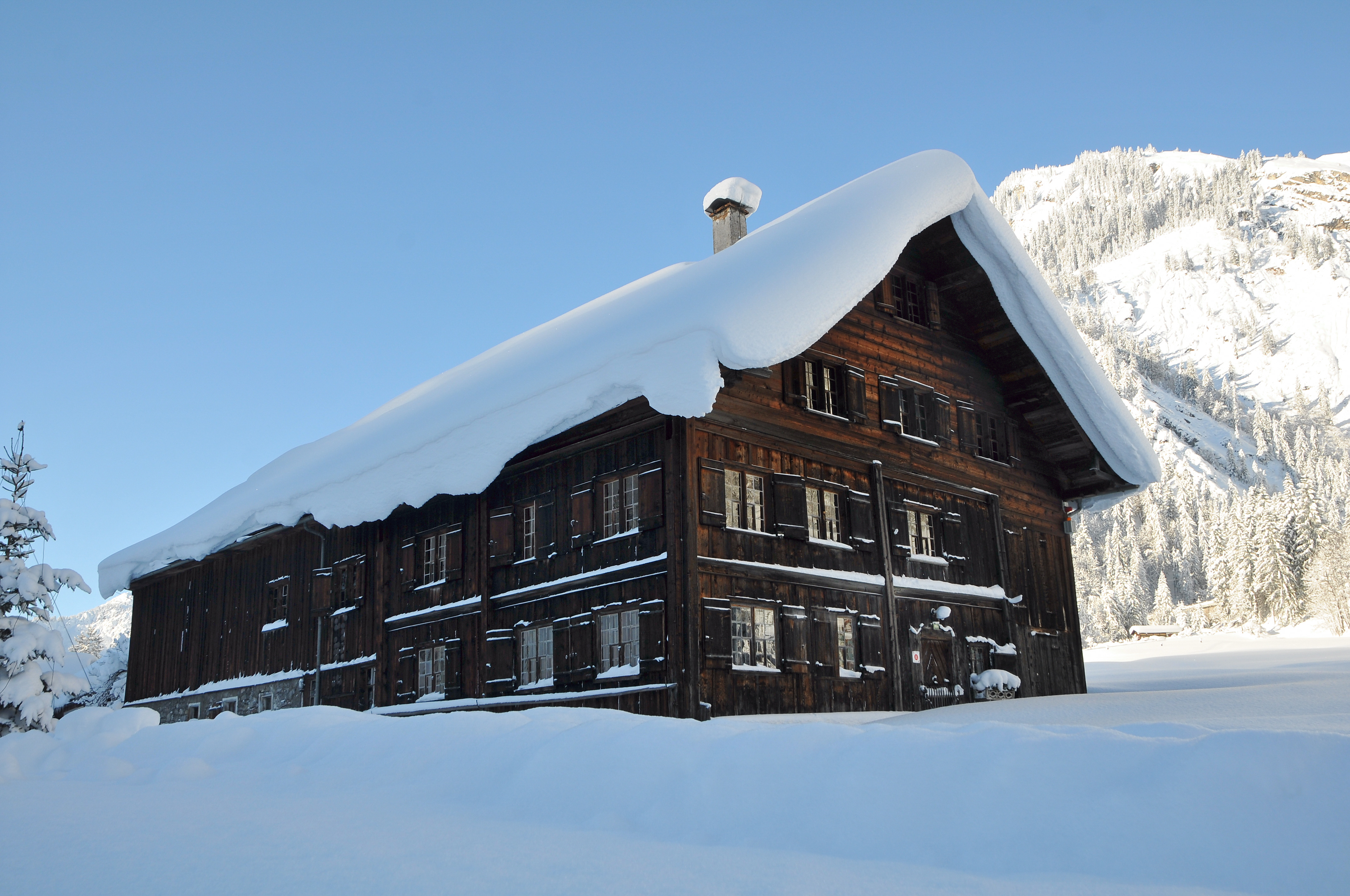 Das Klostertal-Museum in Wald am Arlberg 11, Dalaas.